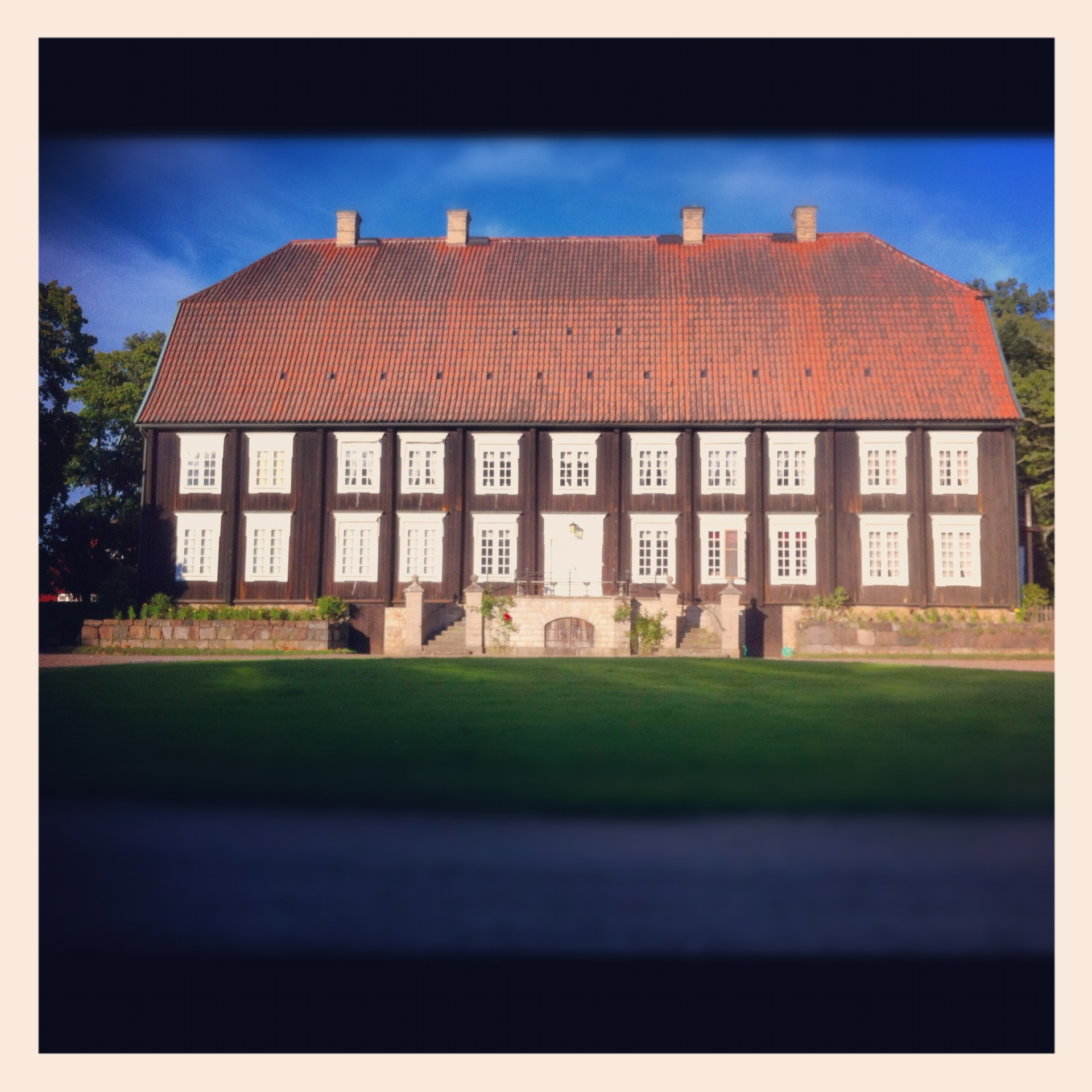 Corps de logi, Strömsrums gård, Sverige